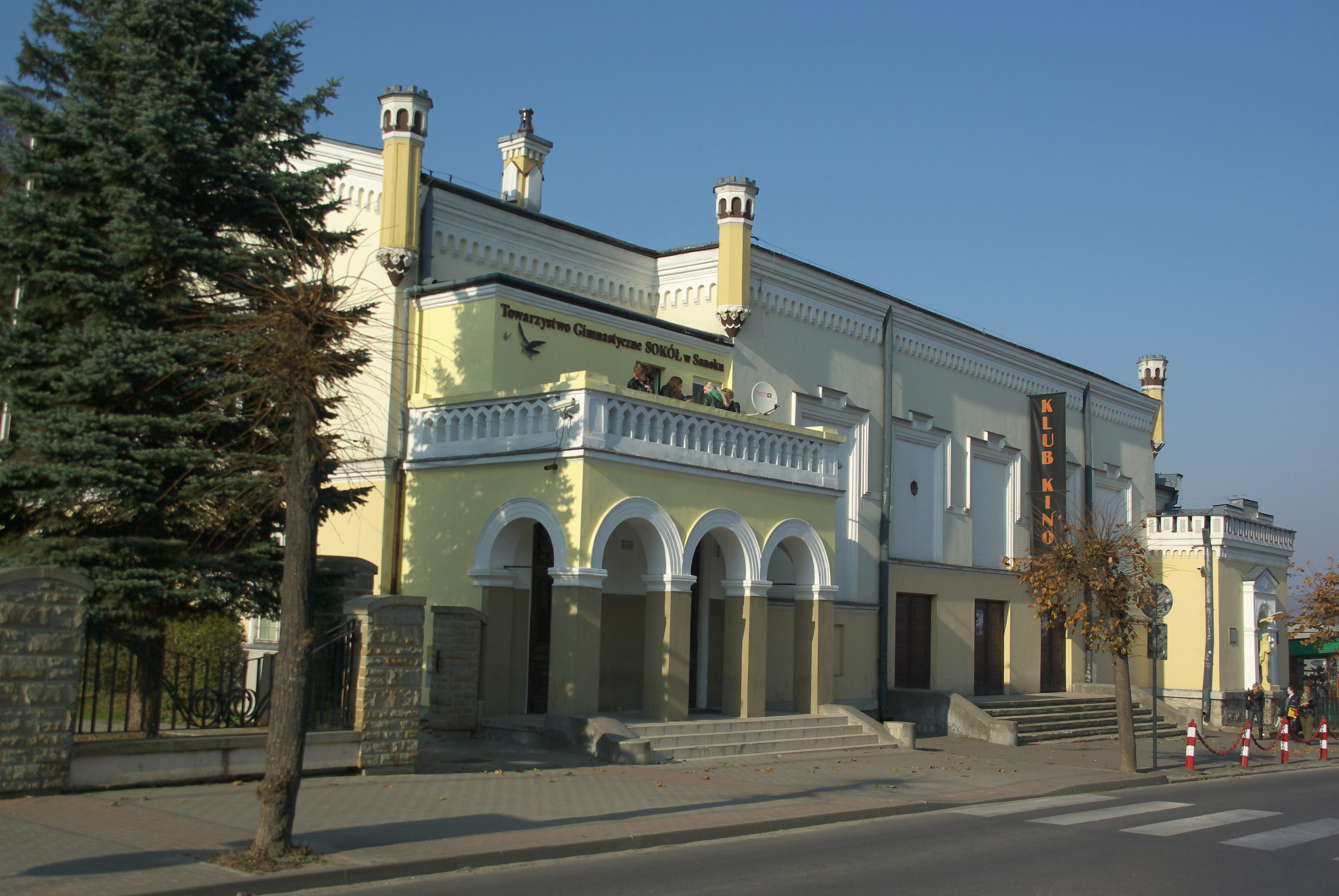 Mickiewicza 13, Sanok 2011, siedziba TG Sokół